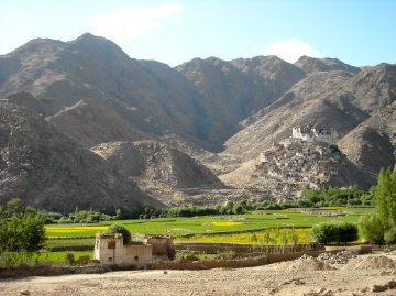 Thikse, Ladakh, India